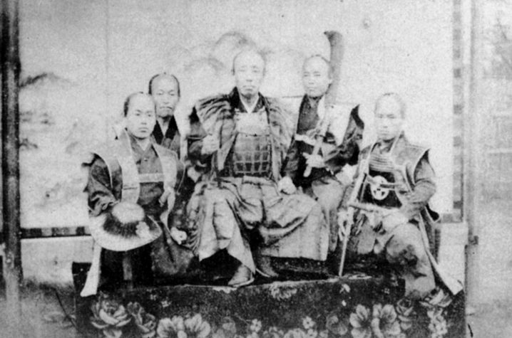 左から、乙部剛之進、高橋慎五左衛門、板倉防州守、雨森謙一郎、磯村速見